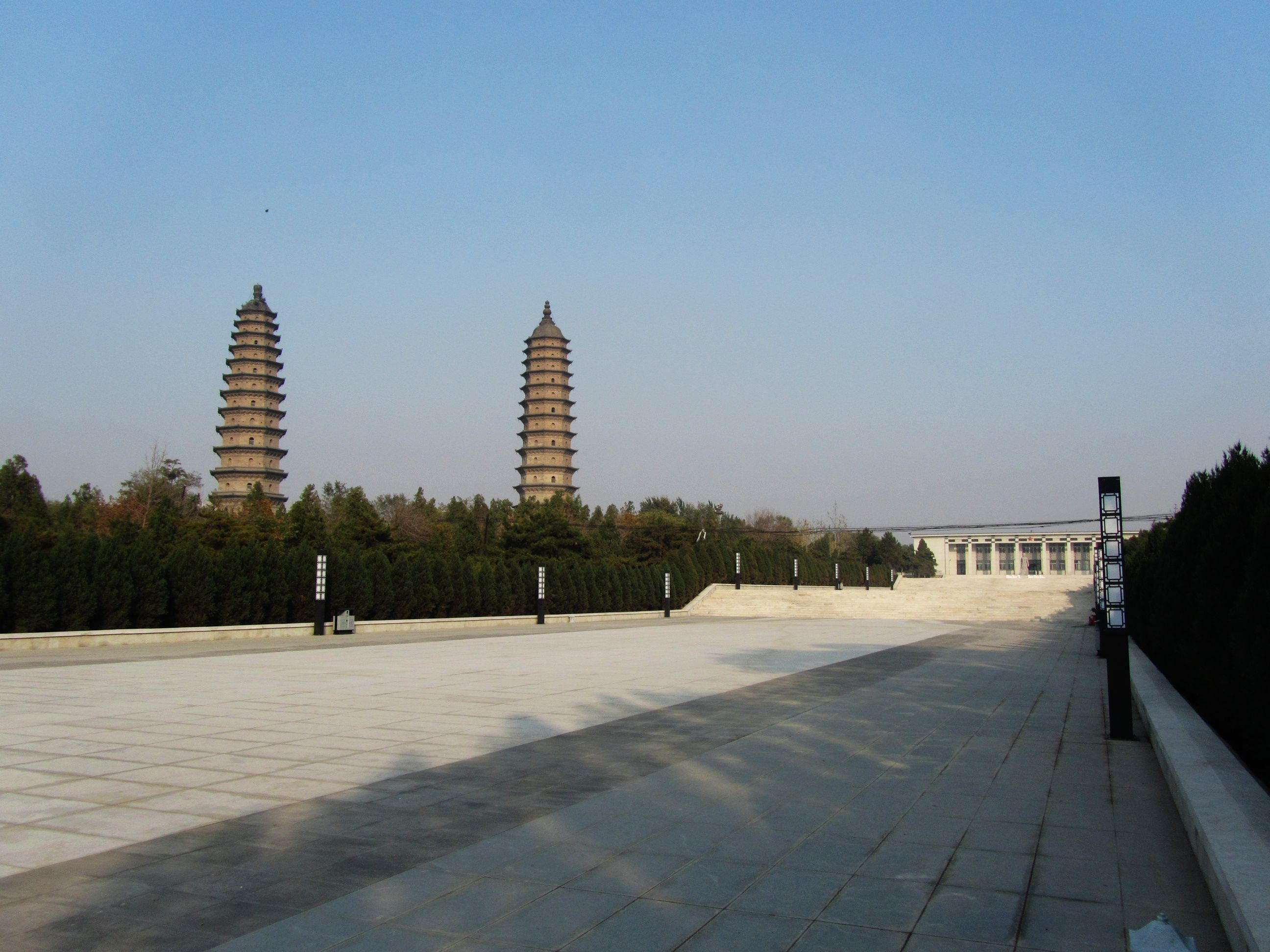 太原双塔革命烈士陵园，自西向东看纪念馆及双塔。